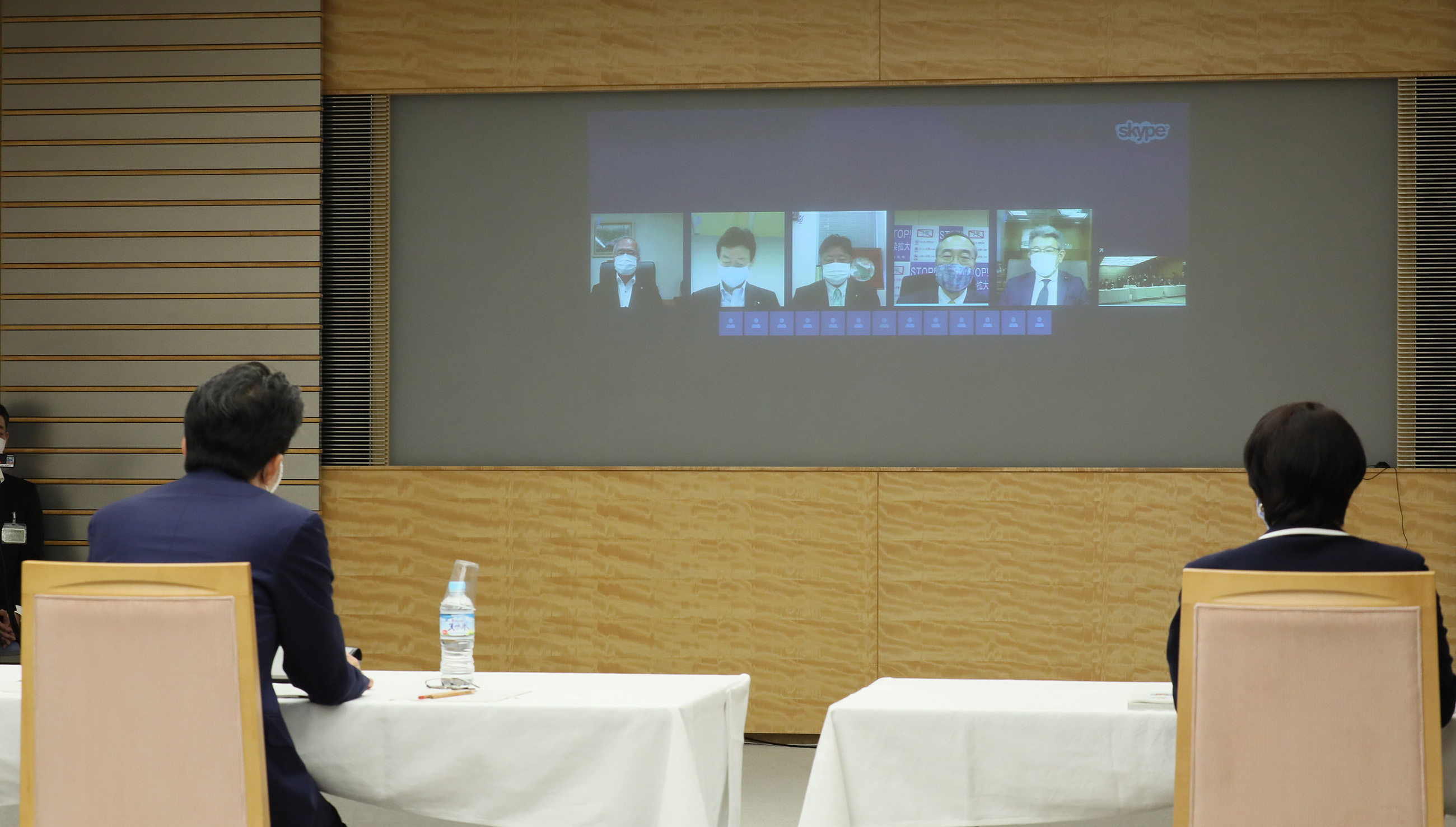 令和2年5月19日、安倍総理は、総理大臣官邸で令和2年度第1回国と地方の協議の場に出席しました。